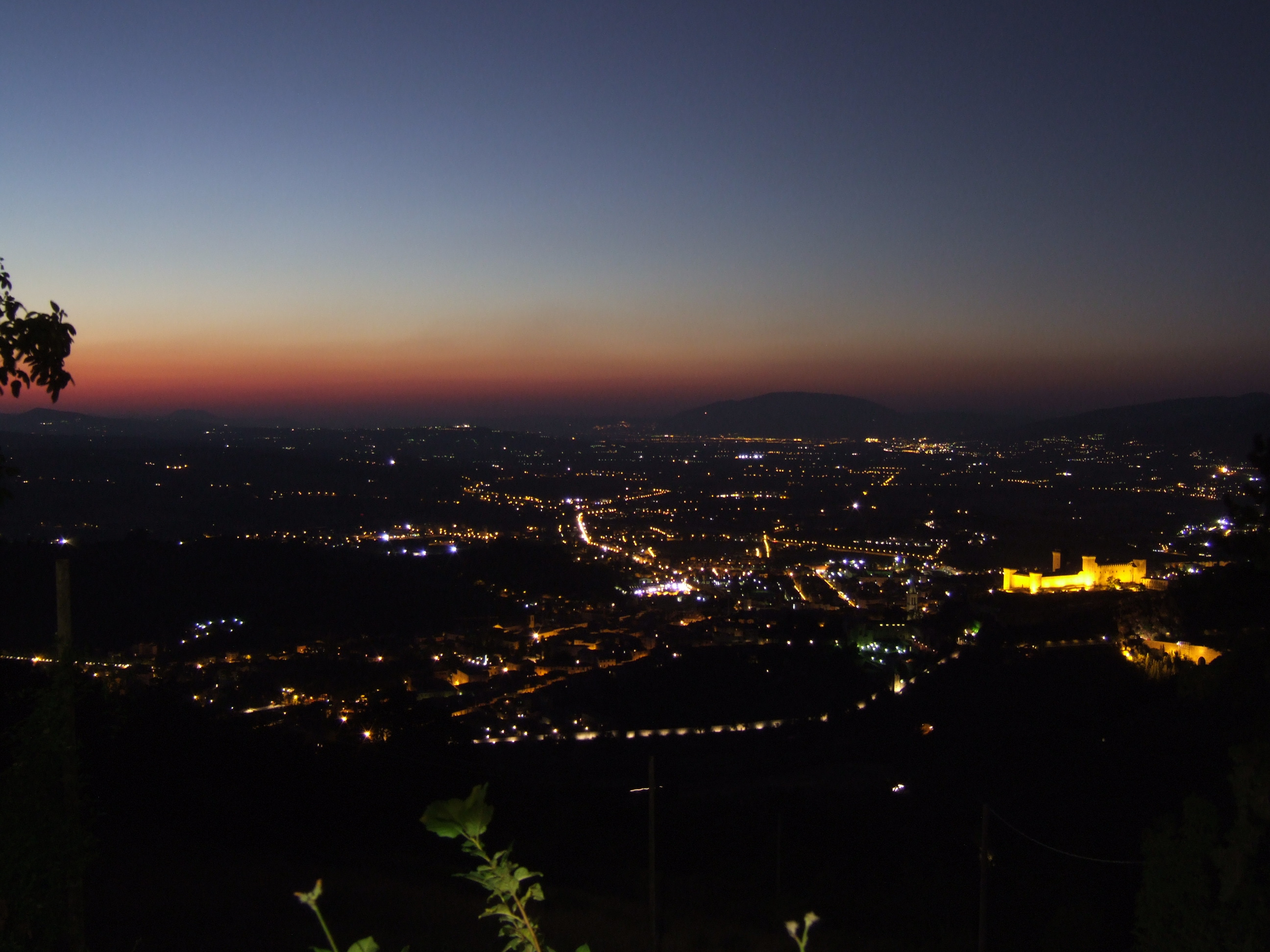 Veduta notturna della valle spoletana dal Monteluco - sullo sfondo, il Monte Subasio ed Assisi (alle sue pendici a sinistra)